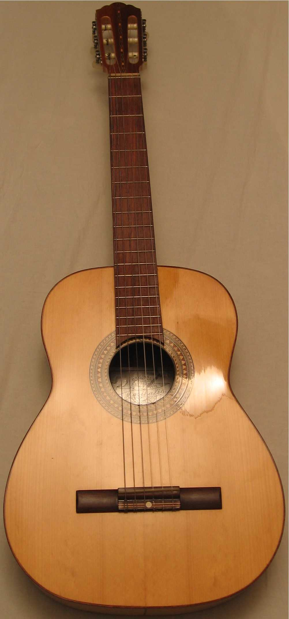 A classic guitar